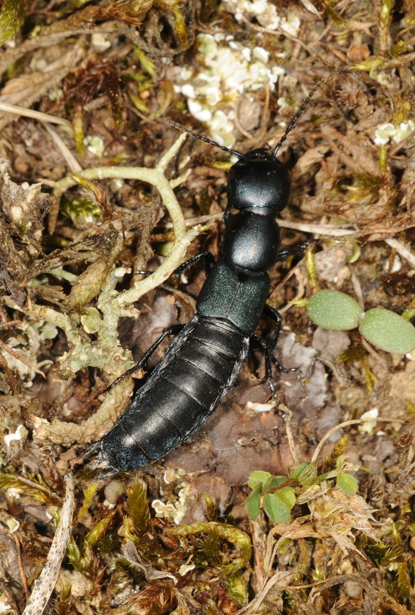 Ocypus ophthalmicus det. Frank Köhler (2011), Steinau bei Schlüchtern, Main-Kinzig-Kreis, Hessen, Deutschland